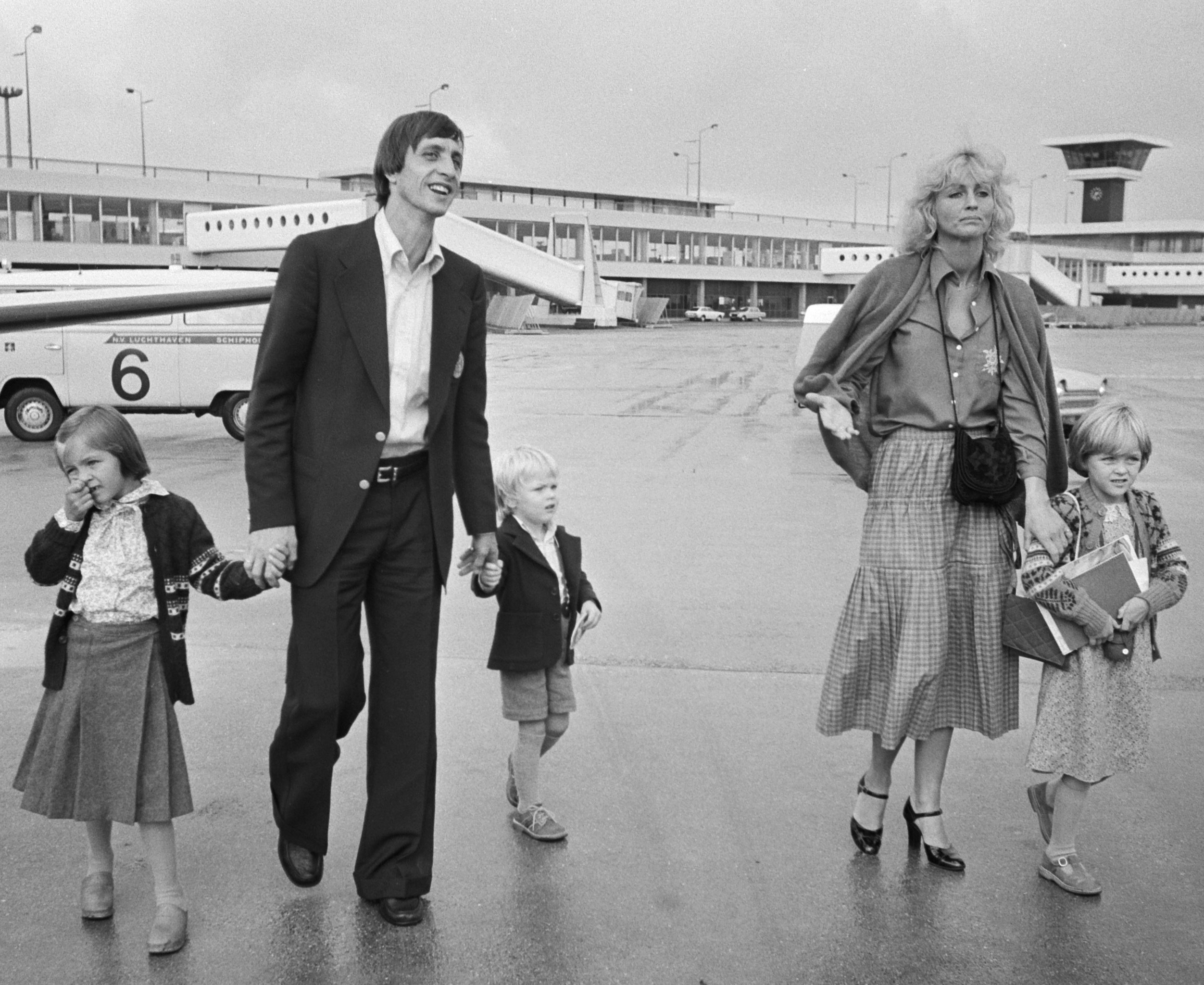 Vertrek Nederlands elftal van Schiphol naar Noord Ierland Cruyff met zoontje Jordi, links Danny Cruyff